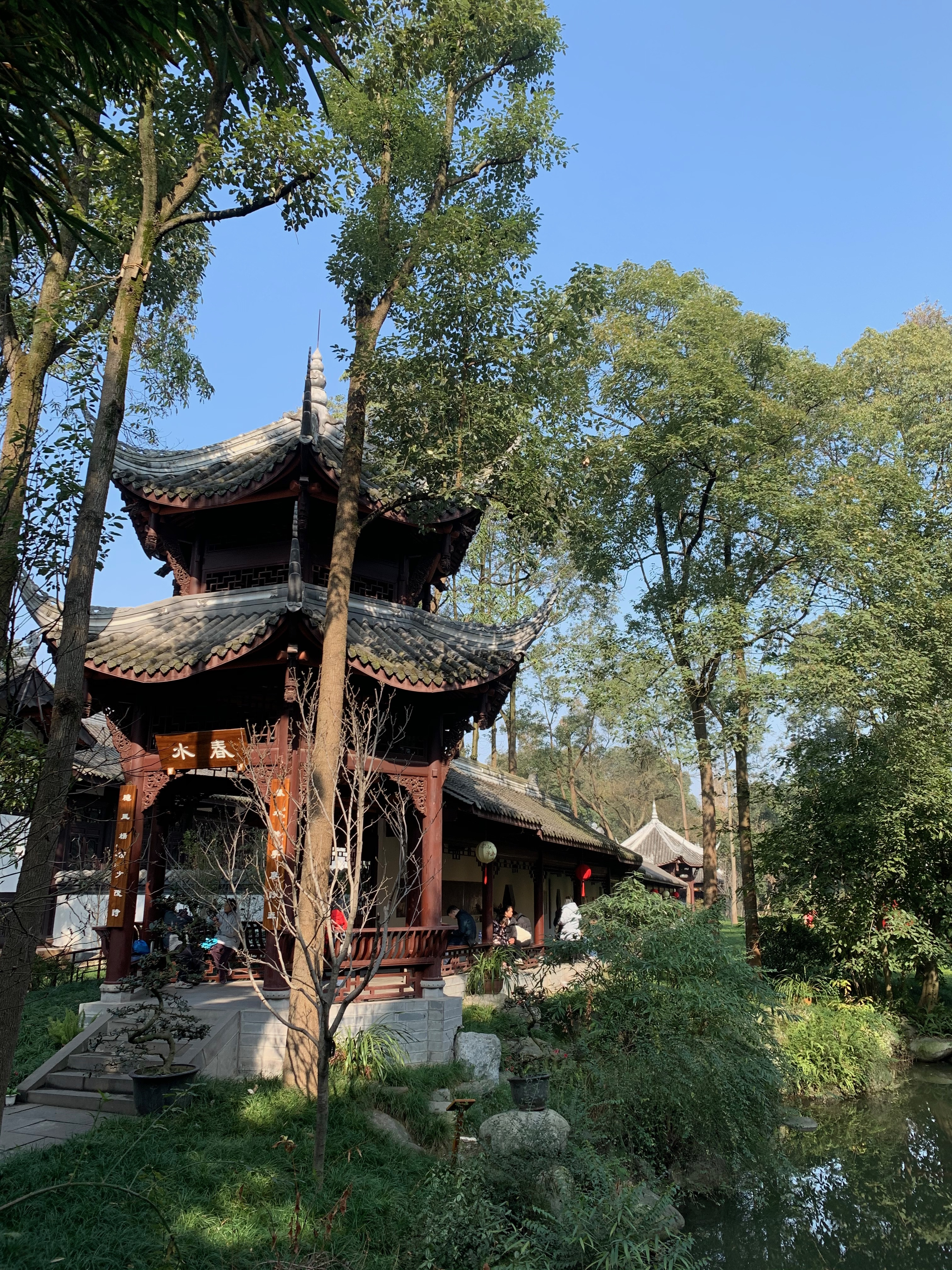 Świątynia Gongbu